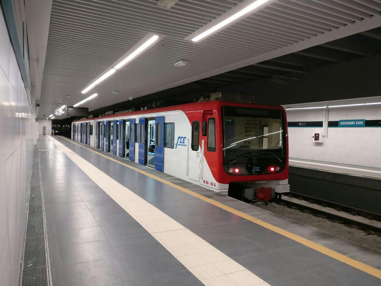 Stazione Giovanni XXIII della metropolitana di Catania